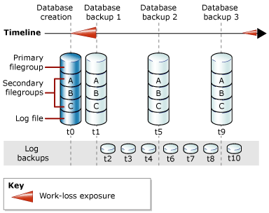 Монгол: Бүрэн сэргээх загварын дагуу мэдээллийн санг нөөцлөх